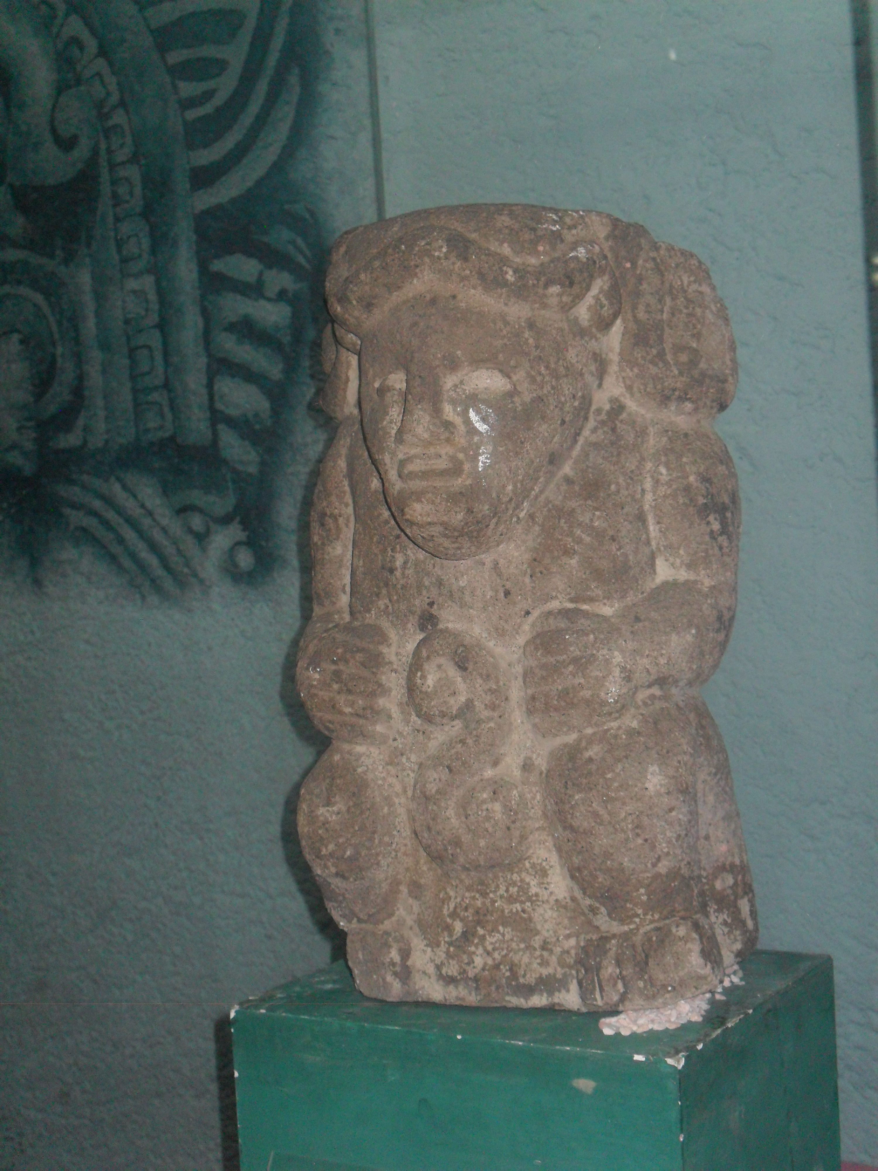 Cihuacóatl, conocida como la mujer de la serpiente, es la diosa del nacimiento y patrona de los médicos de Xochimilco encontrada en el Museo Arqueológico de Xochimilco, Ciudad de México